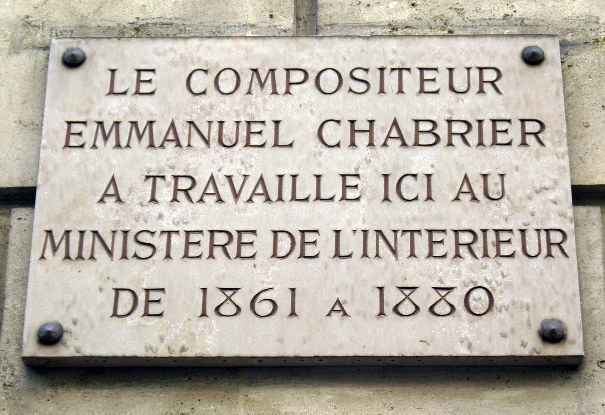 Plaque apposée sur l'un des immeubles du ministère de l'Intérieur, au n° 7 de la rue Cambacérès, Paris 8e, où travailla le compositeur Emmanuel Chabrier (1841-1894) entre 1861 et 1880.